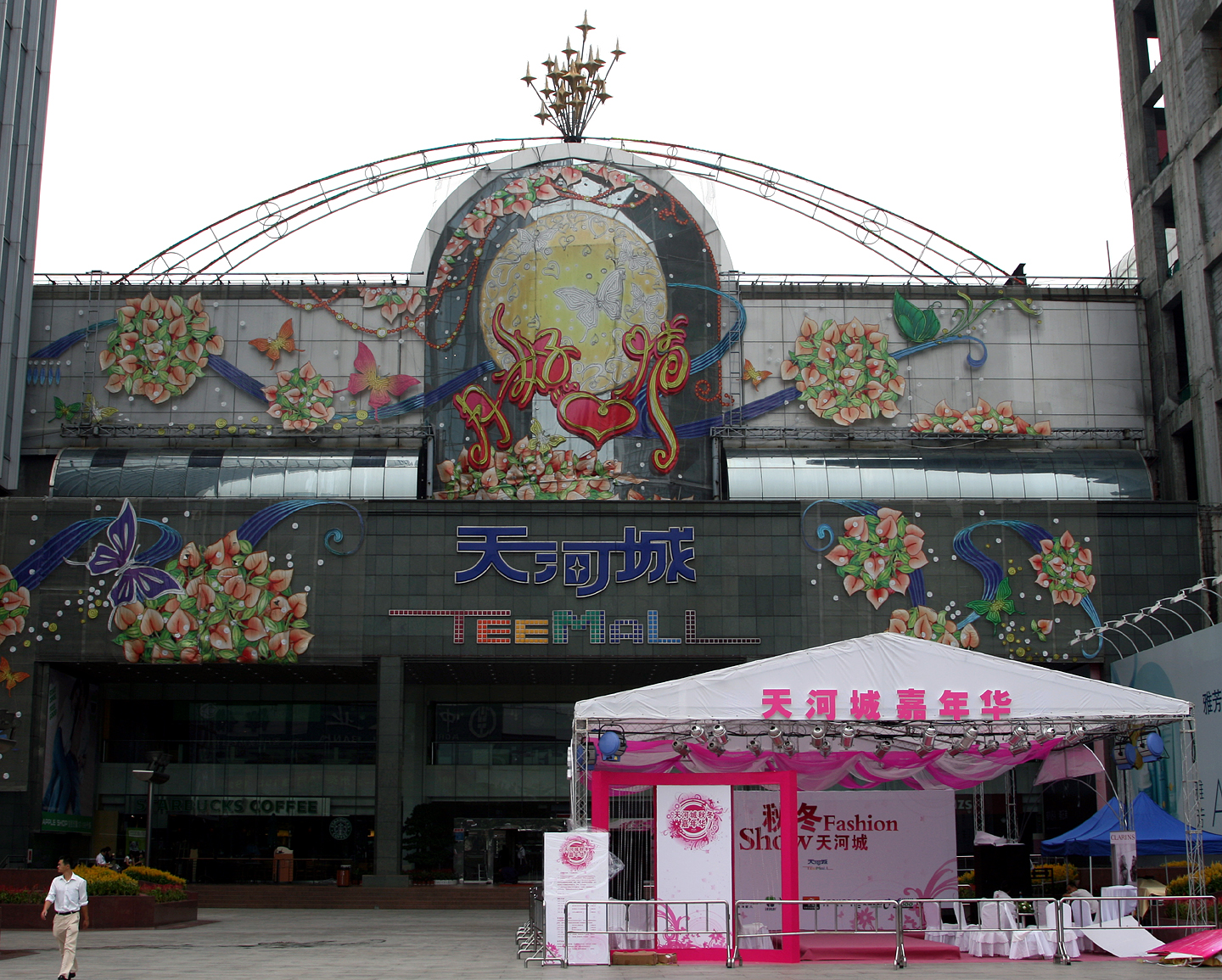 天河城北门广场